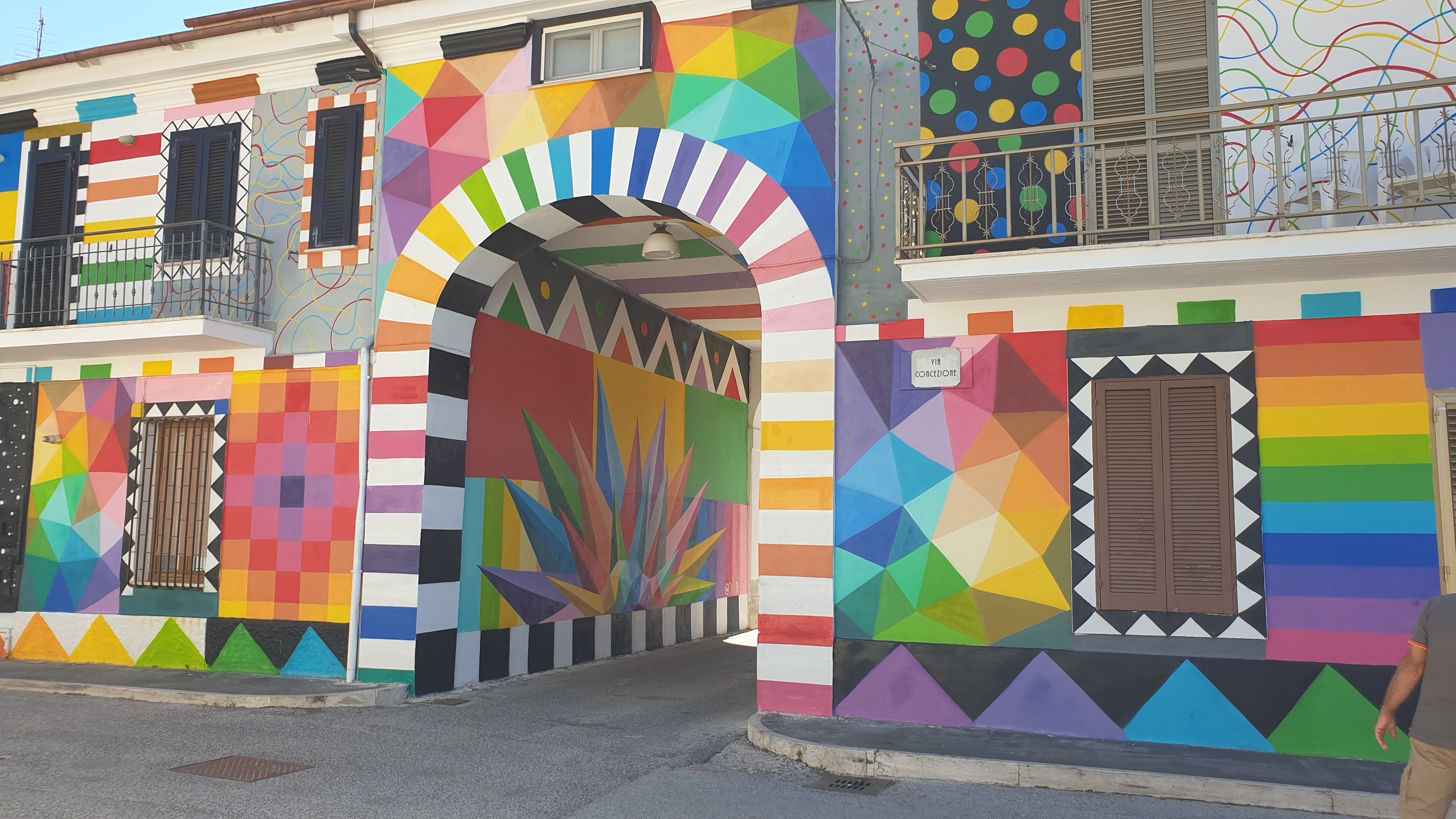 Aielli - Porte